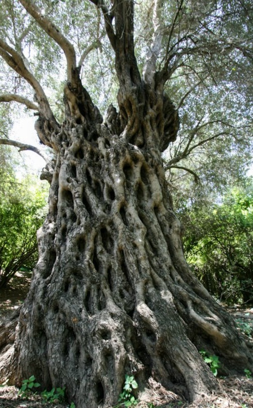 شجرة في غابات برقش بالأردن.